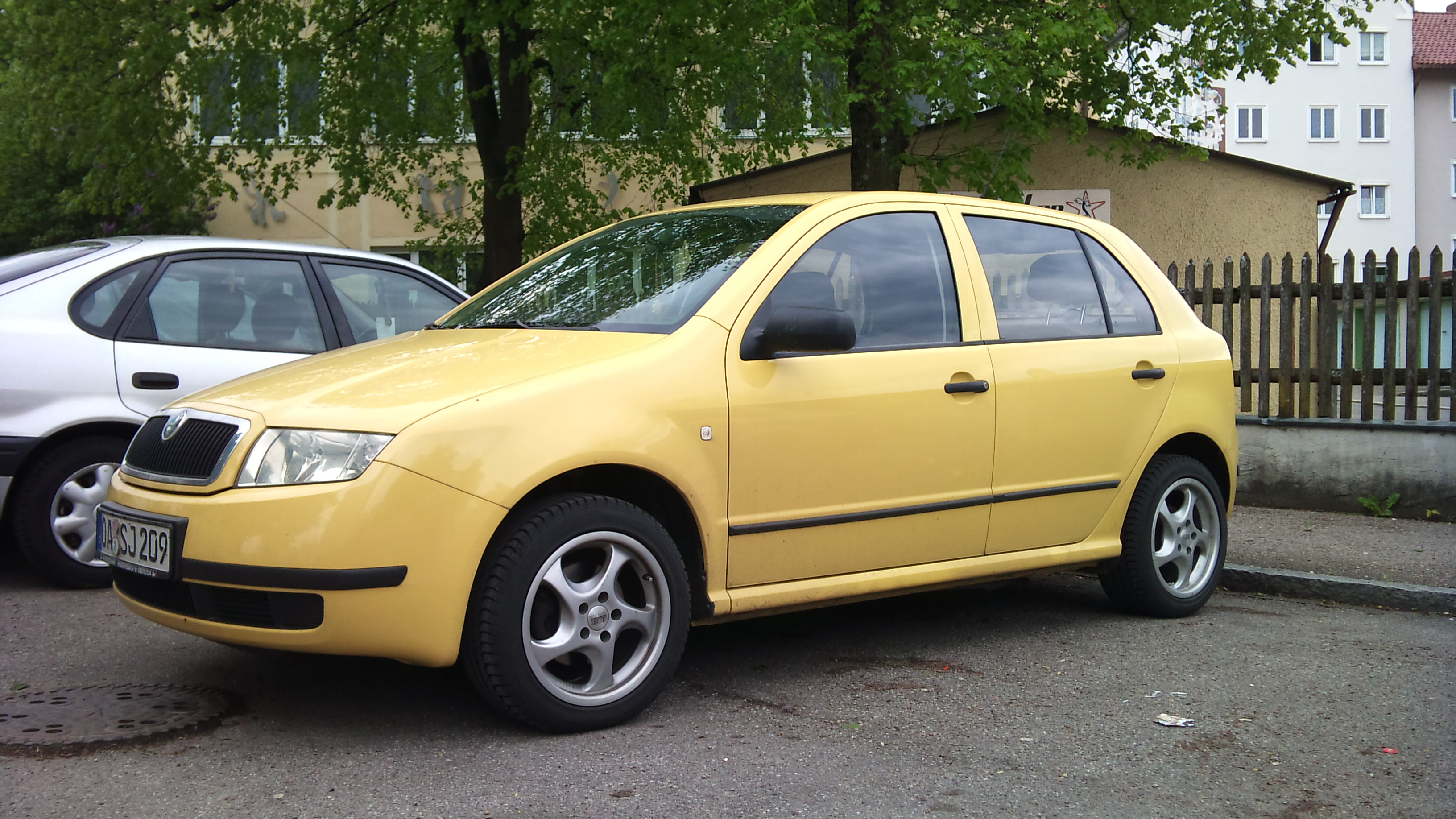 Skoda Fabia I